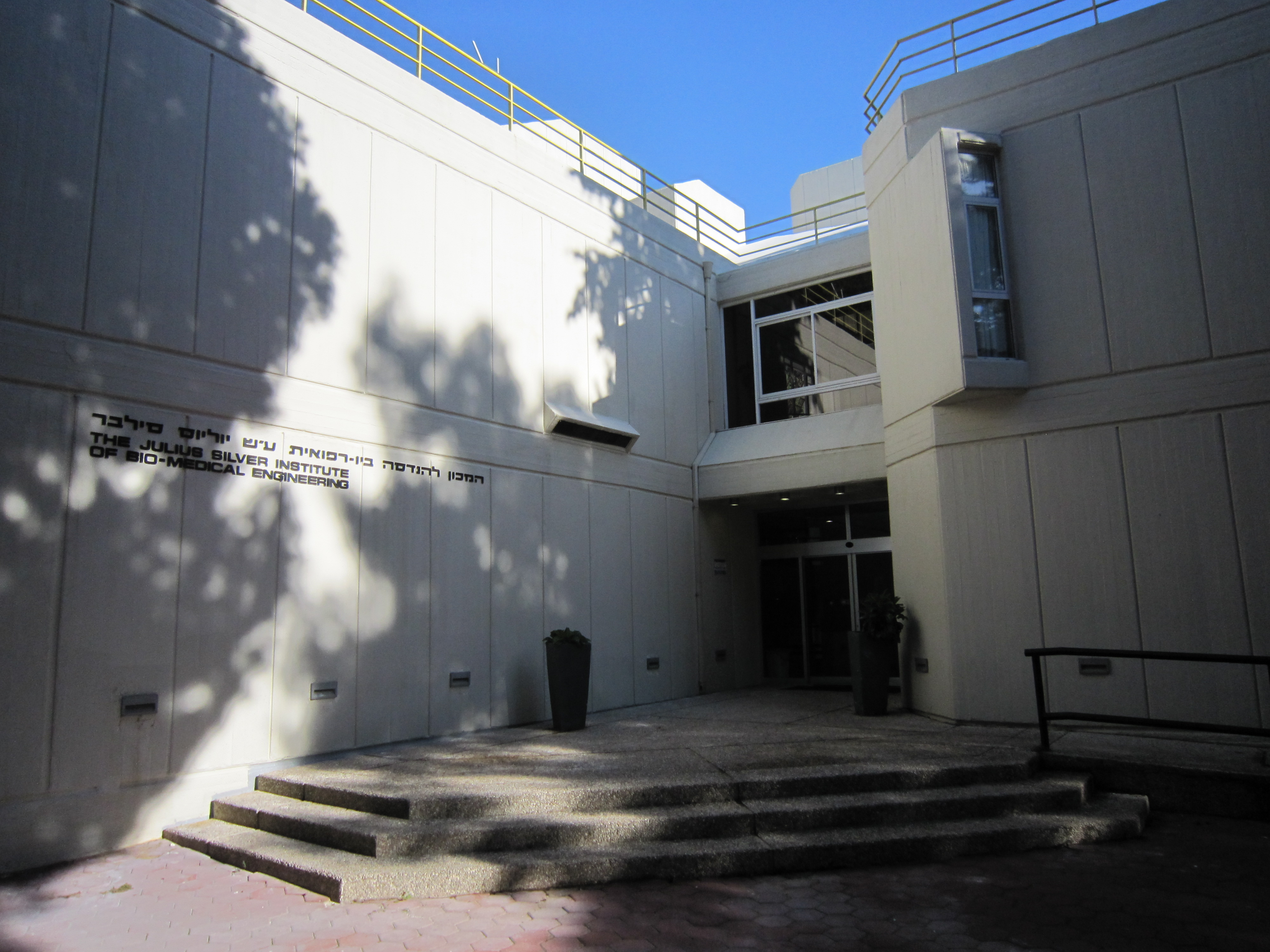 הפקולטה להנדסה ביורפואית